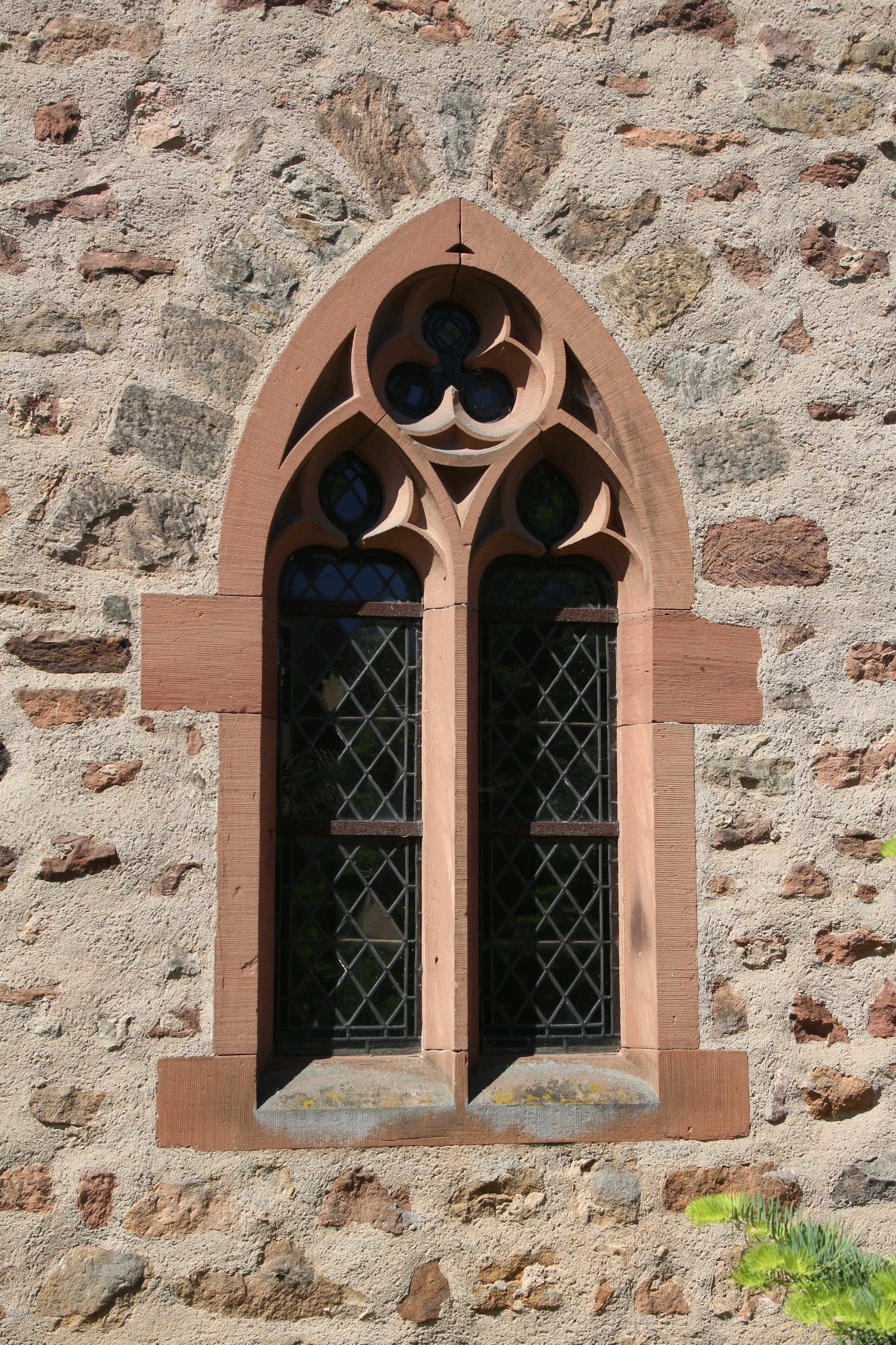 Siehe Bild und Dateiname